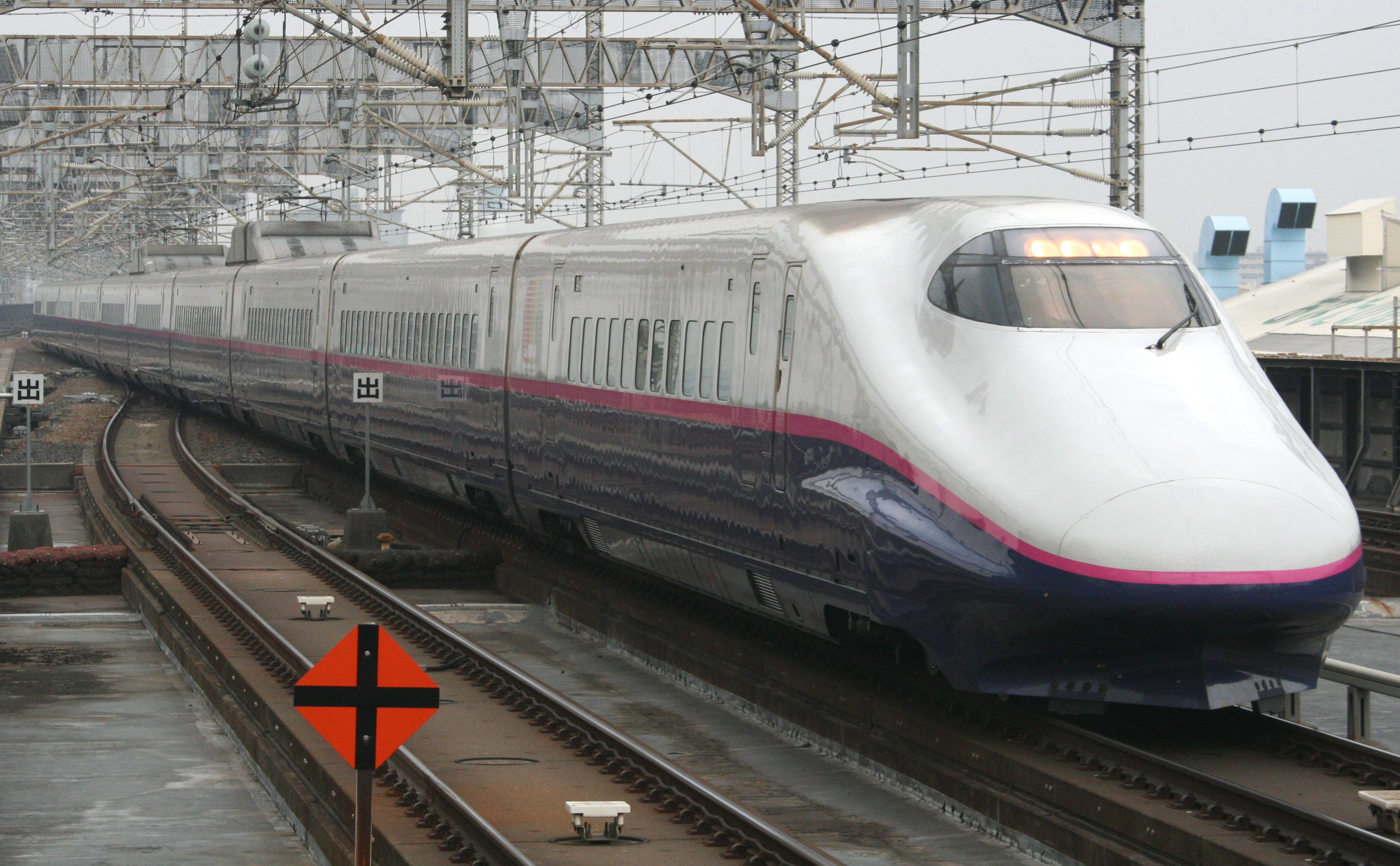 新幹線E2系電車